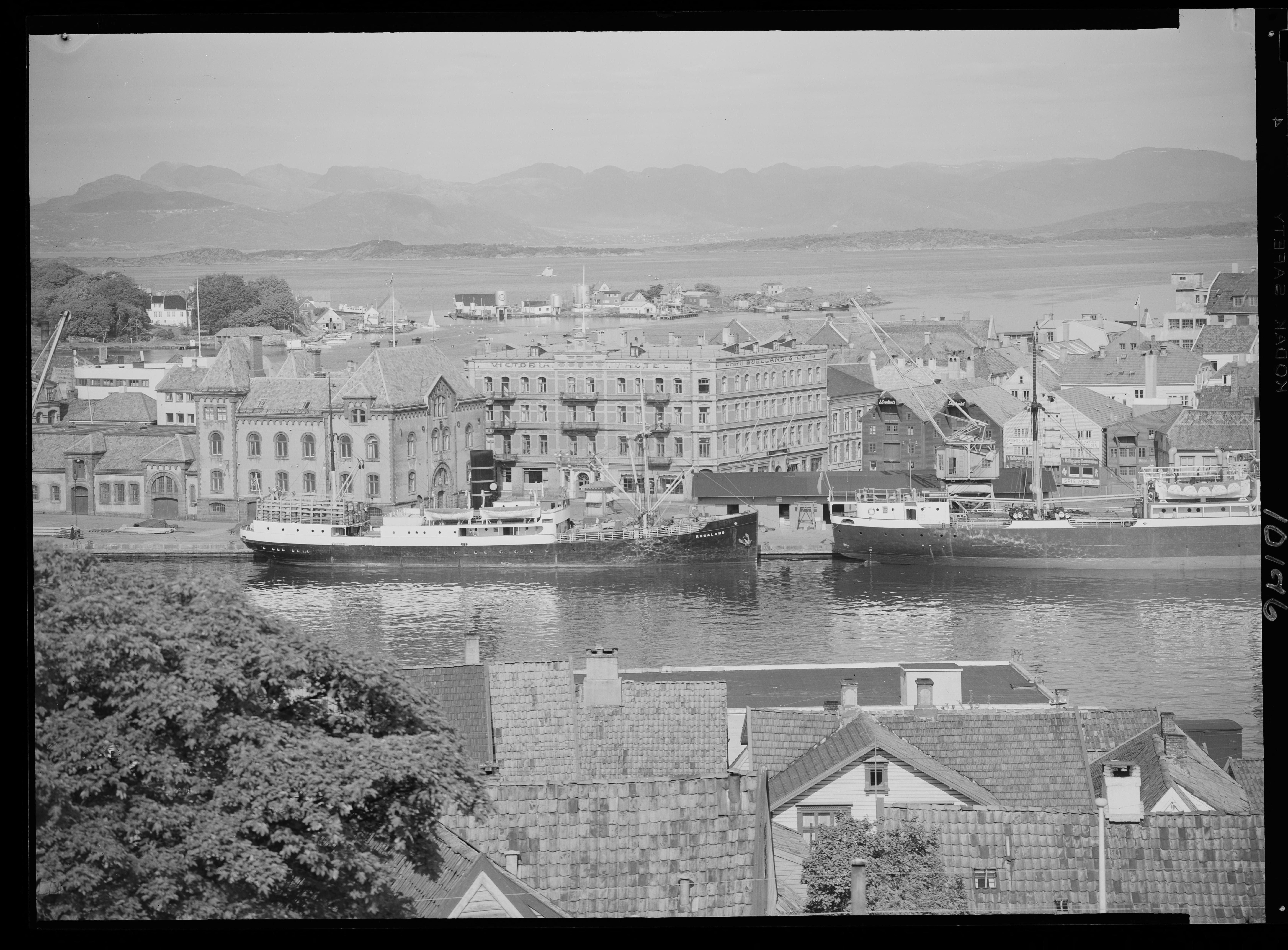 Bildet er hentet fra Nasjonalbibliotekets bildesamling. Anmerkninger til bildet var: Fotograf : ukjent Stavanger, Stavanger, Rogaland